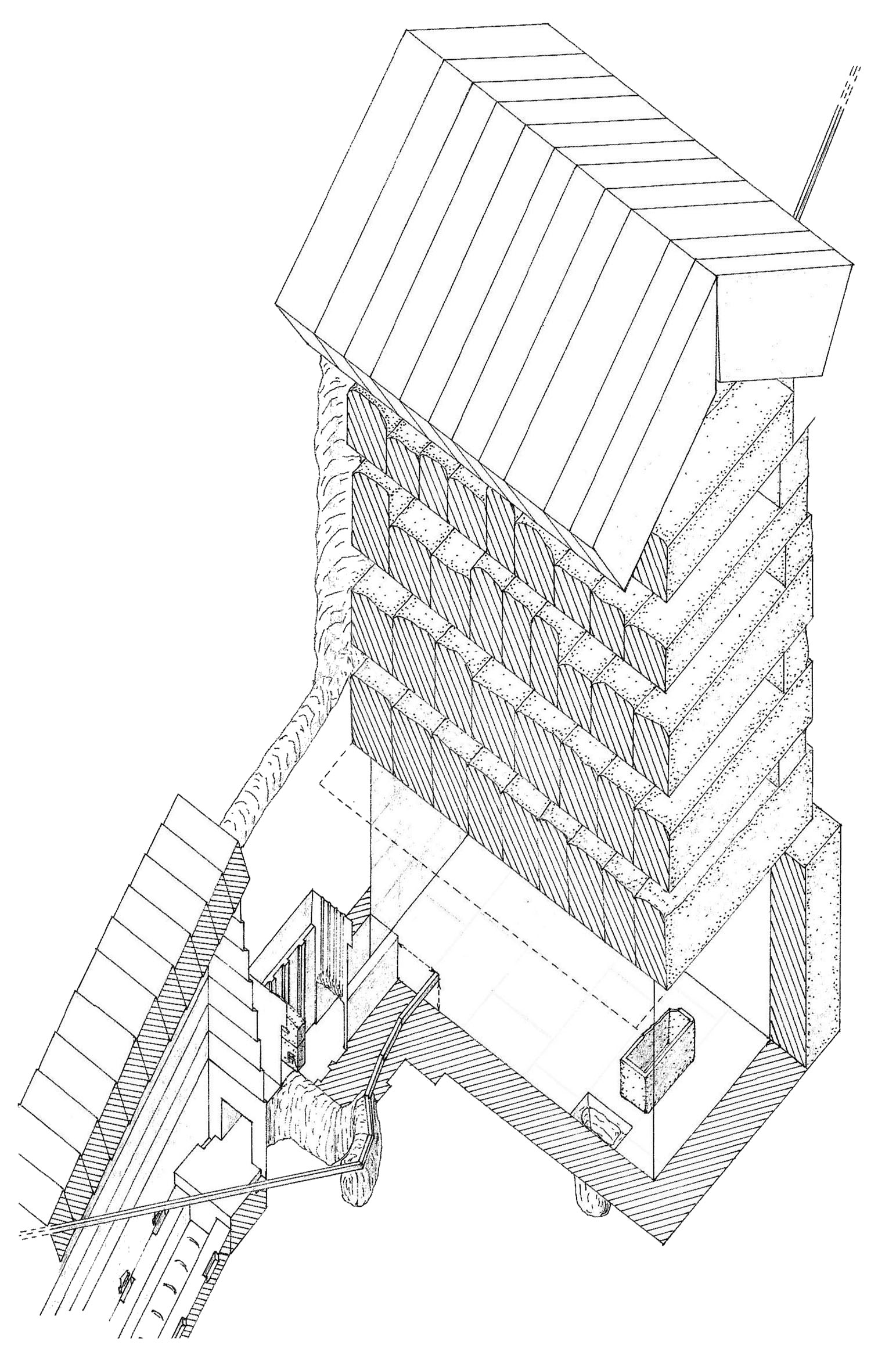 Vue axonométrique de la chambre du roi de la pyramide de Khéops